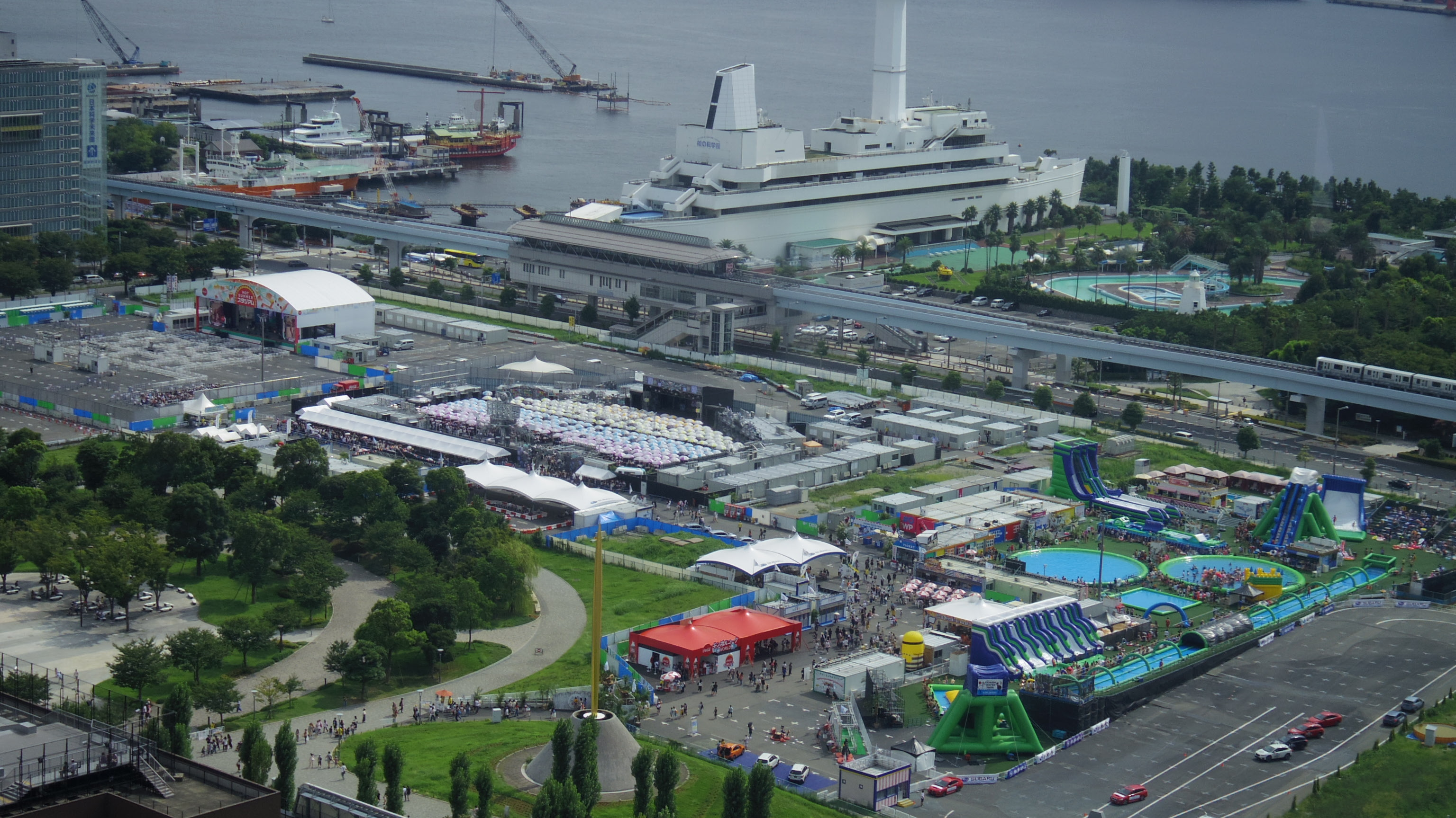 「お台場みんなの夢大陸2017・スマイルランド」全体眺望。2017年8月27日、フジテレビ本社屋24階から撮影。